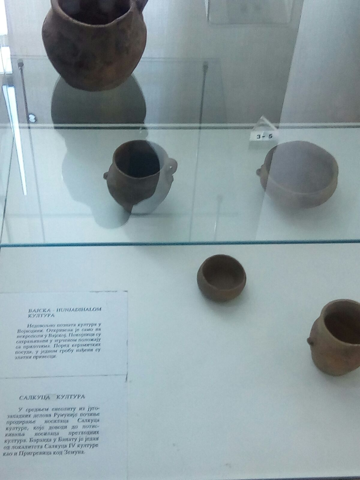 Eksponat u muzeju Vojvodine u Novom Sadu